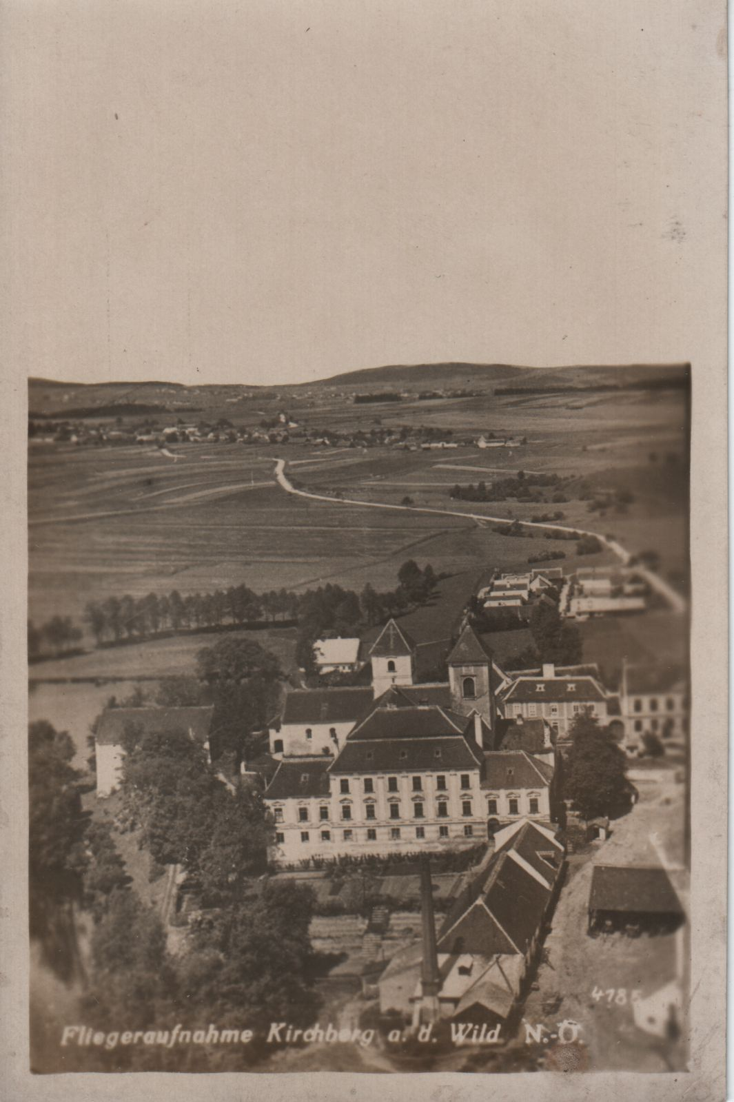 Scan einer Postkarte von Kirchberg aus der Wild - Wahrscheinlich in der Zwischenkriegszeit aufgenommen.